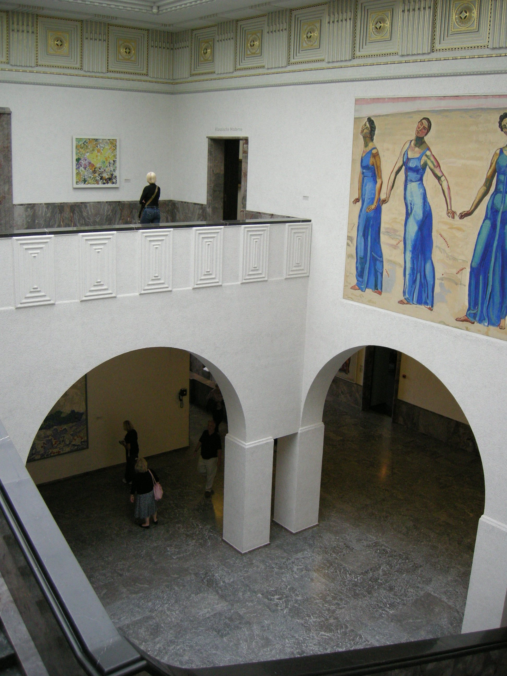 Kunsthaus Zürich, interno, scale